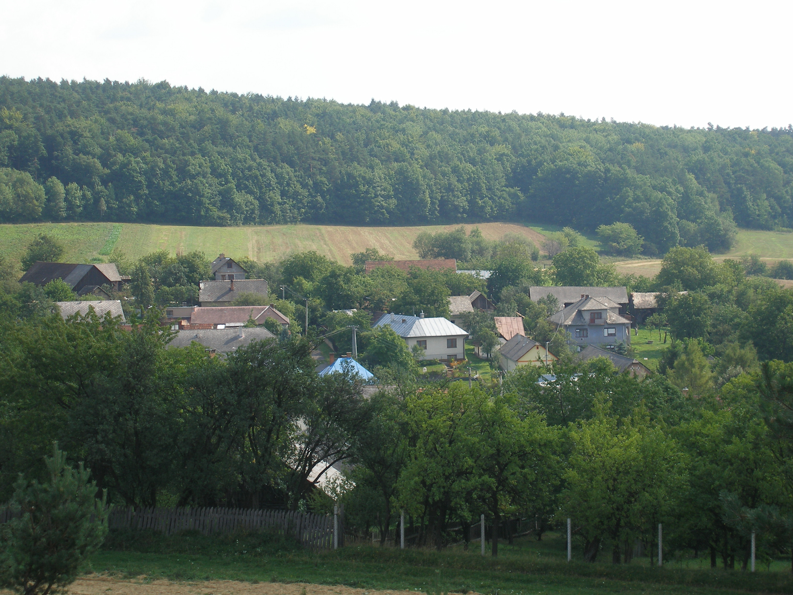 Šarišská obec Daletice